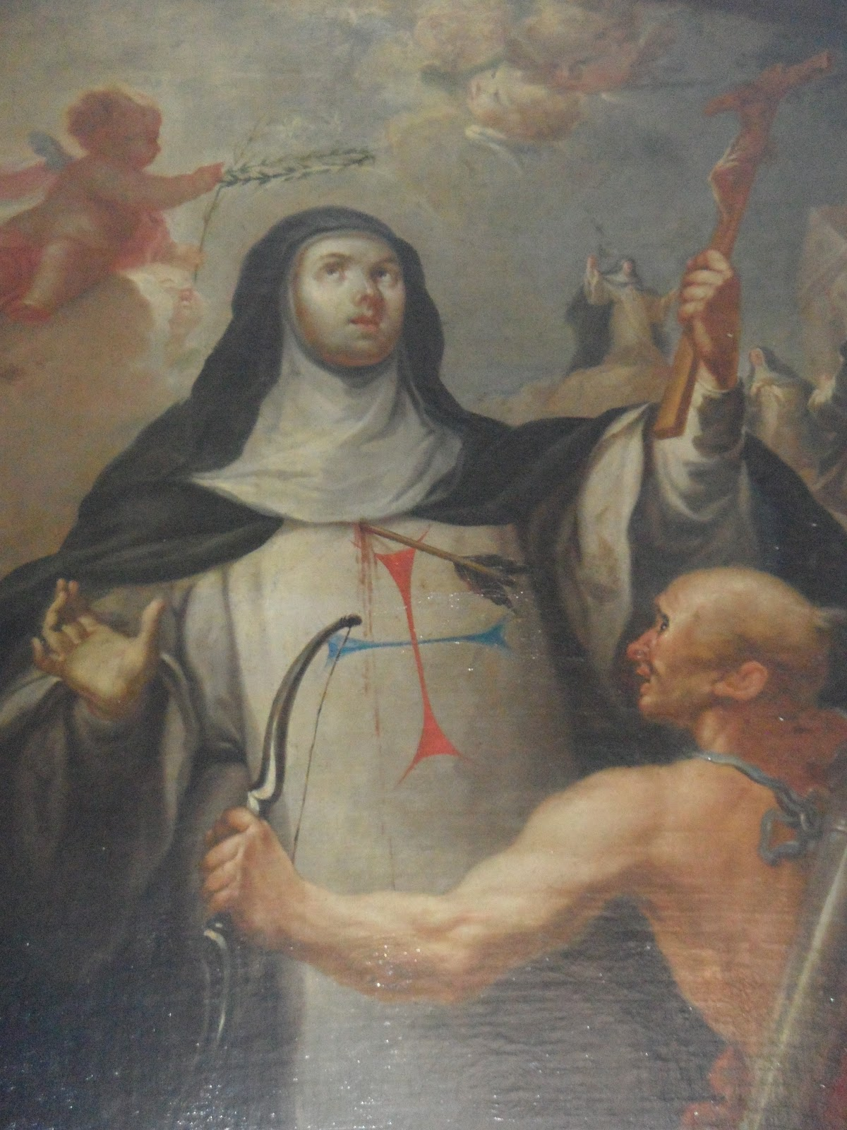 Colección del Monasterio de Monjas Trinitarias de Madrid